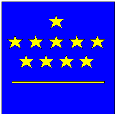 logo KSB zelf, autoCAD